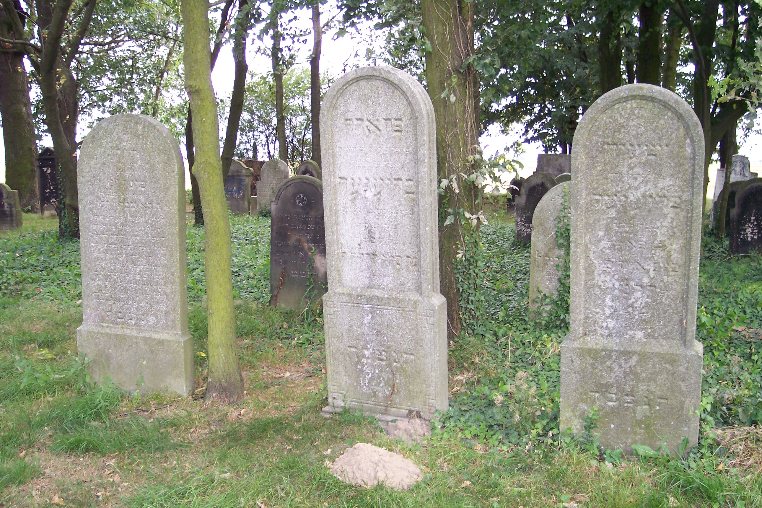 Jüdischer Friedhof in Langendorf, Oberschlesien